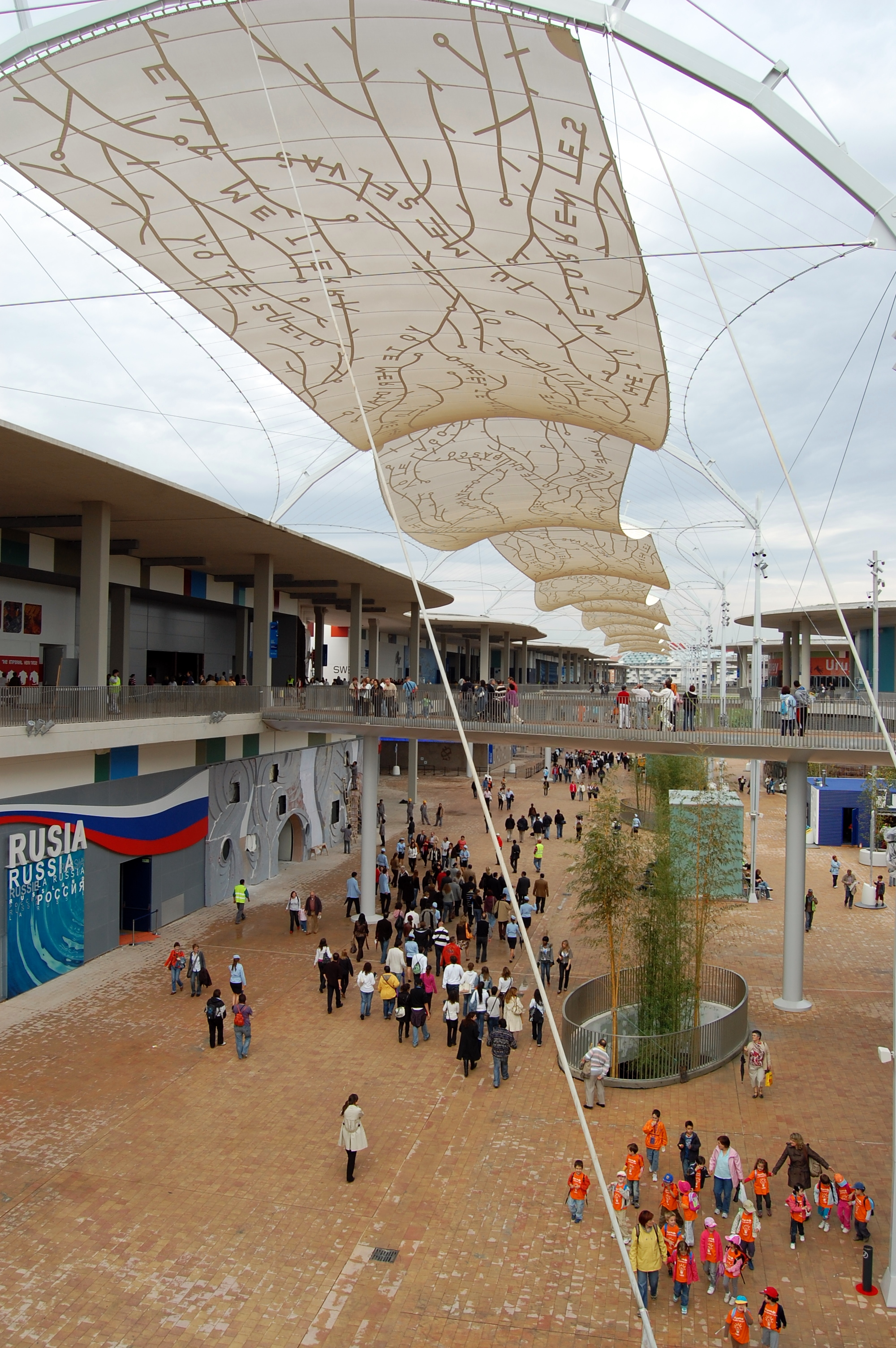 Vista de la Expo 2008 de Zaragoza, España